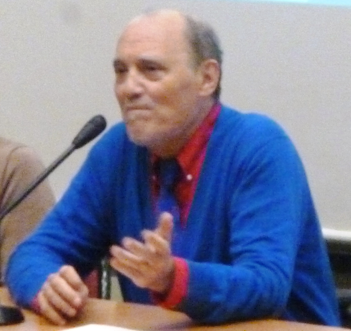 Jean-Paul GOUJON, le 6 novembre 2015